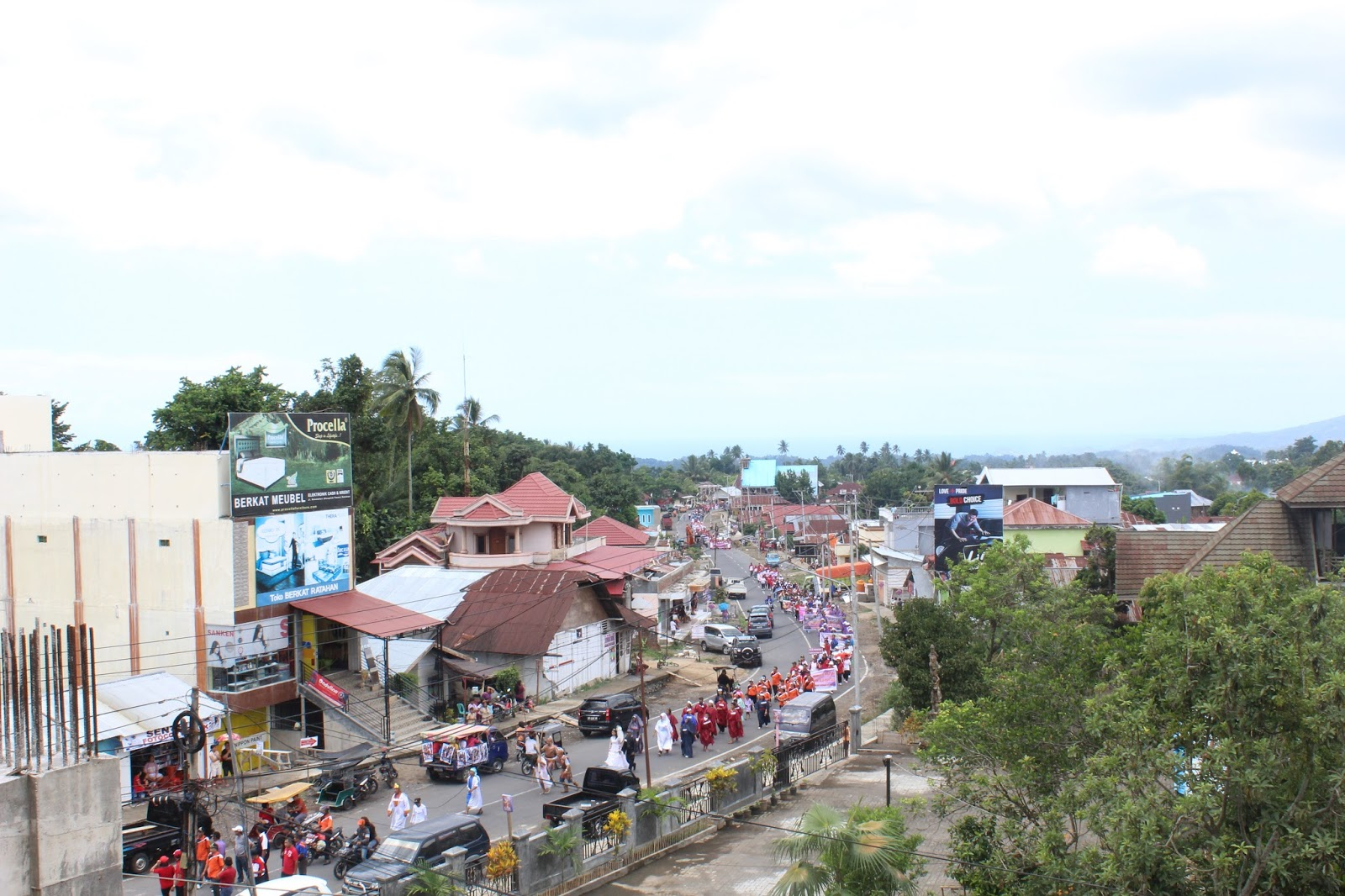 Ratahan City